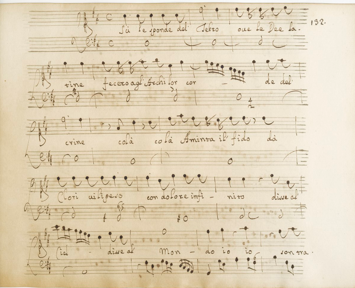 Le premier récitatif de la cantate de chambre d'Alessandro Scarlatti, «Su le sponde del Tebro » H.705, dans la copie de la BnF (RES VMC MS-68, f°132).